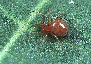 female Entelecara tanikawai from Okinawa.